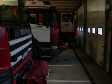 Tartu keskkomando päästeautod